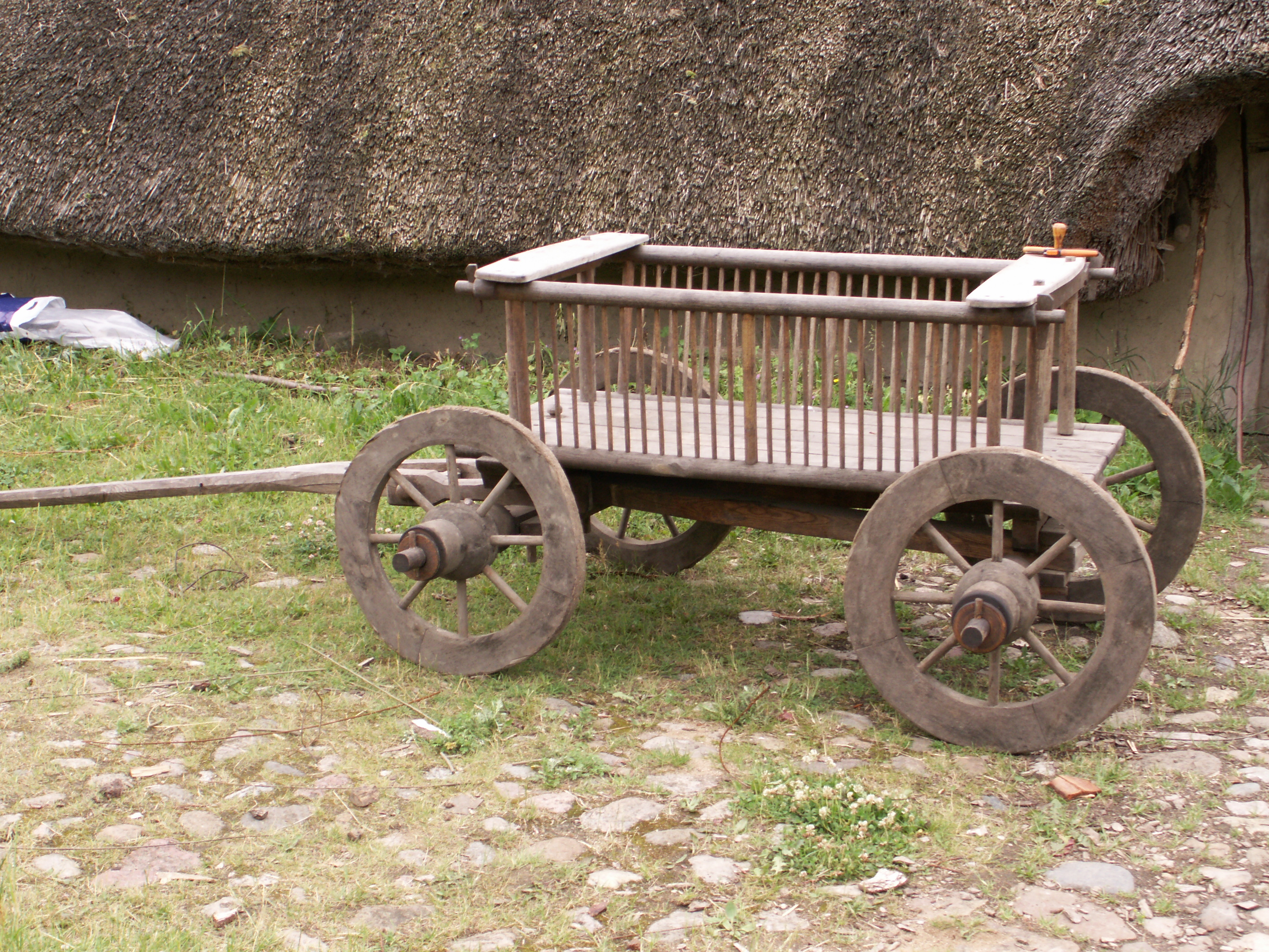 Wagen in Dänemark